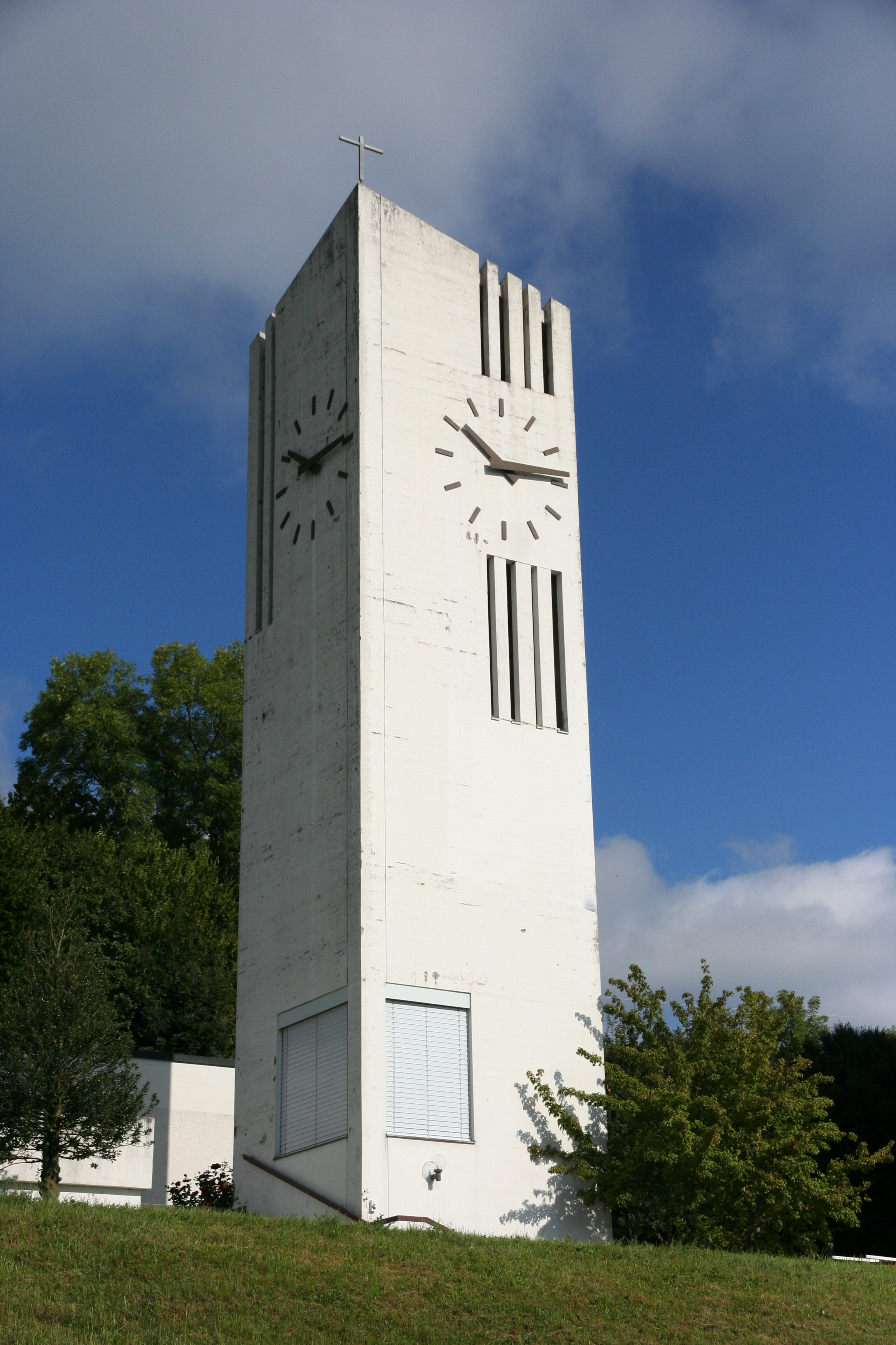 röm.-kath. Pfarrkirche Maria Königin Sitterdorf TG